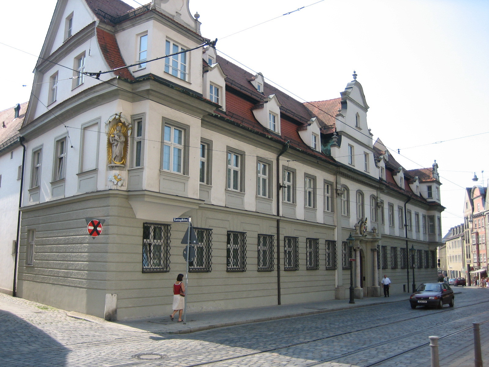 Heutige Bischofsresidenz in Augsburg, dem Dom schräg gegenüber am Hohen Weg